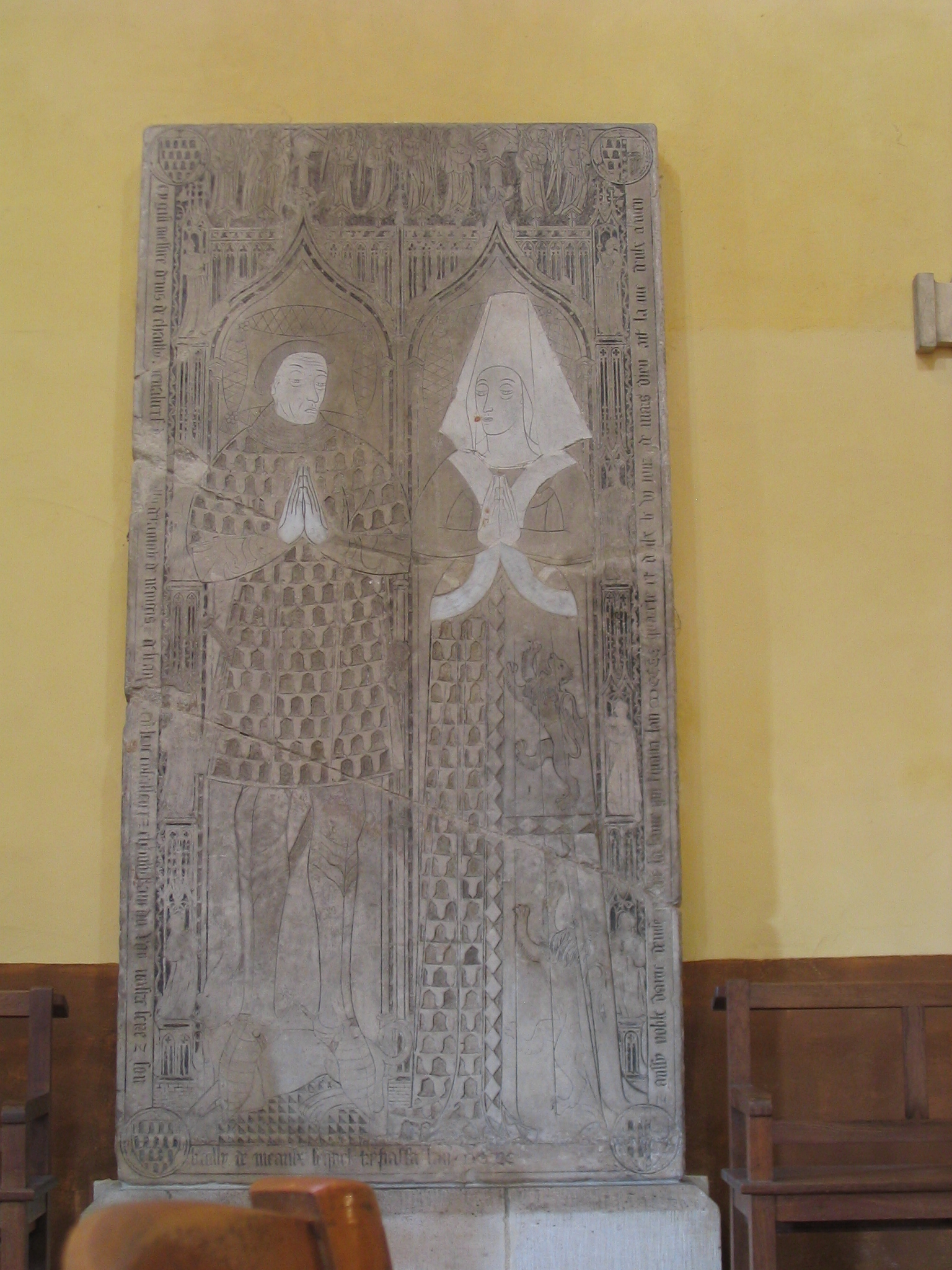 Dalle funéraire de Denis de Chailly, militaire du XIVe siècle, et de son épouse Denise Pisdoë.